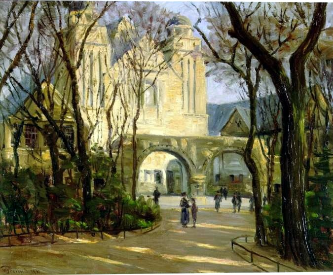 Synagogue Friedberger Anlage